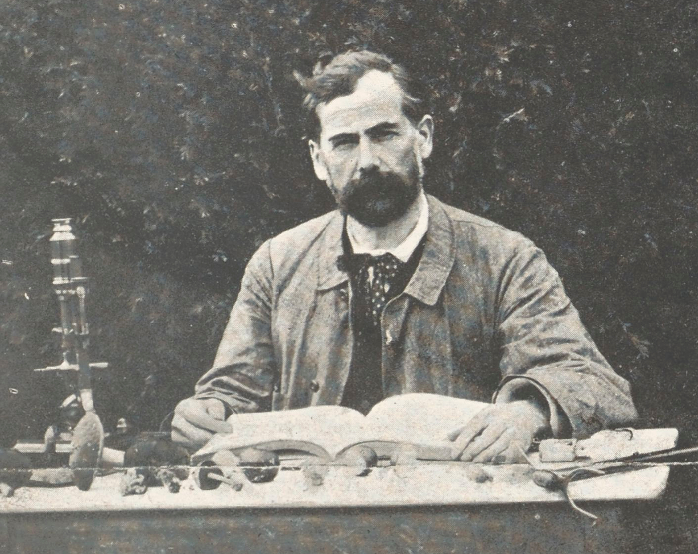 Docteur Lucien Quélet (1832-1899), Mycologue Français